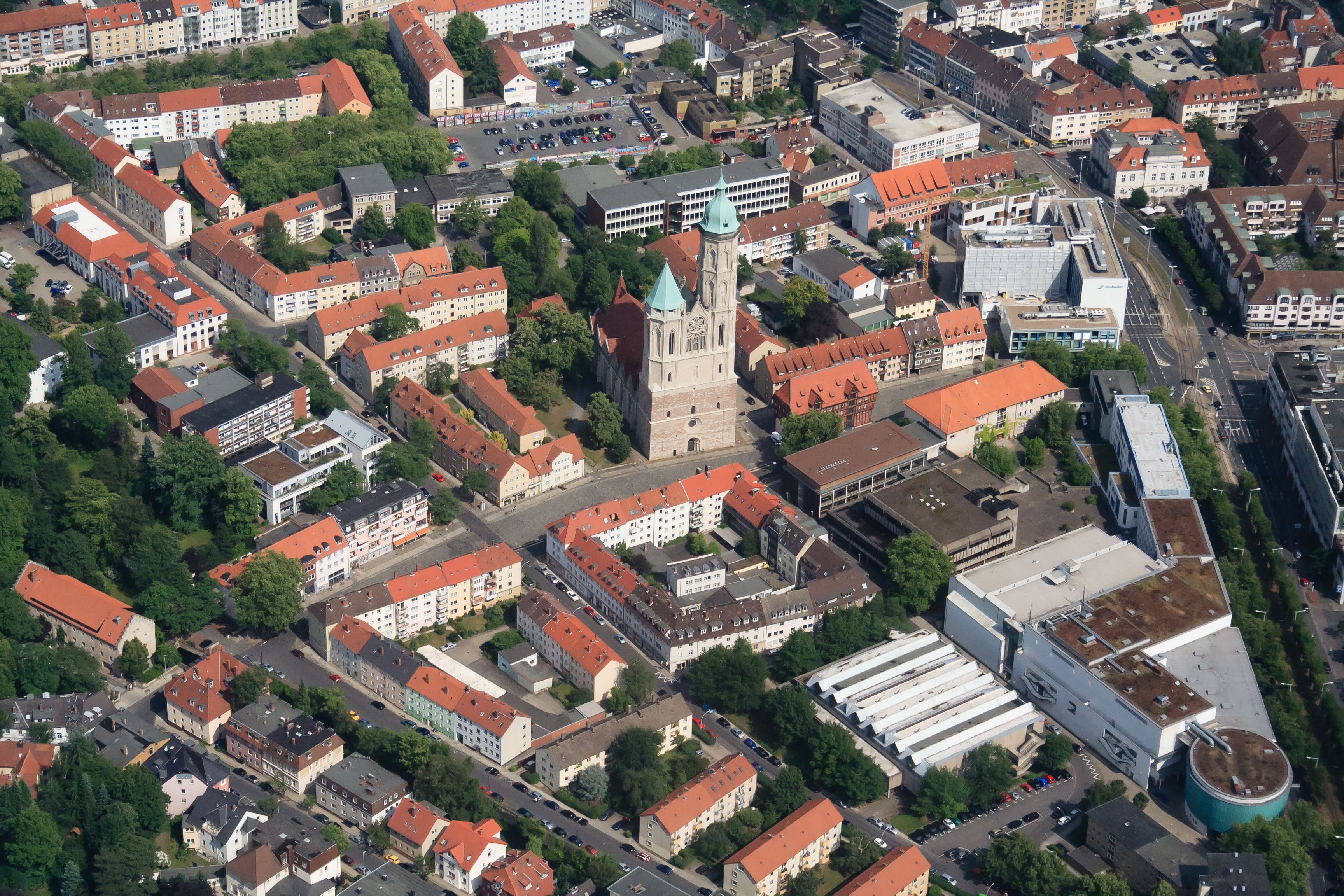 Luftaufnahme der Braunschweiger Andreaskirche und der Umgebung